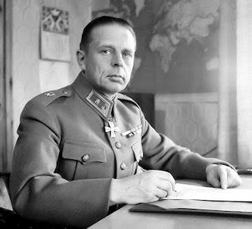 Jatkosodan 2. Divisioonan komentaja kenraalimajuri A. E. Martola